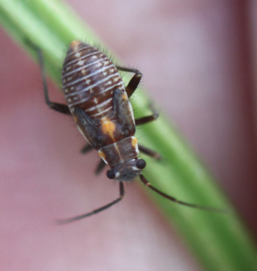 Nymphe von Capsodes gothicus am 23. Mai 2019 in der Schwetzinger Hardt